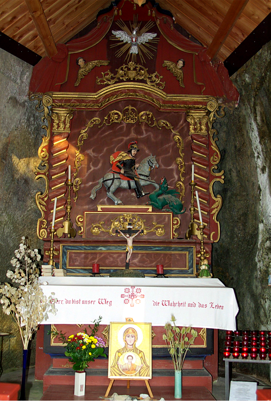 Palfenkapelle hl. Georg